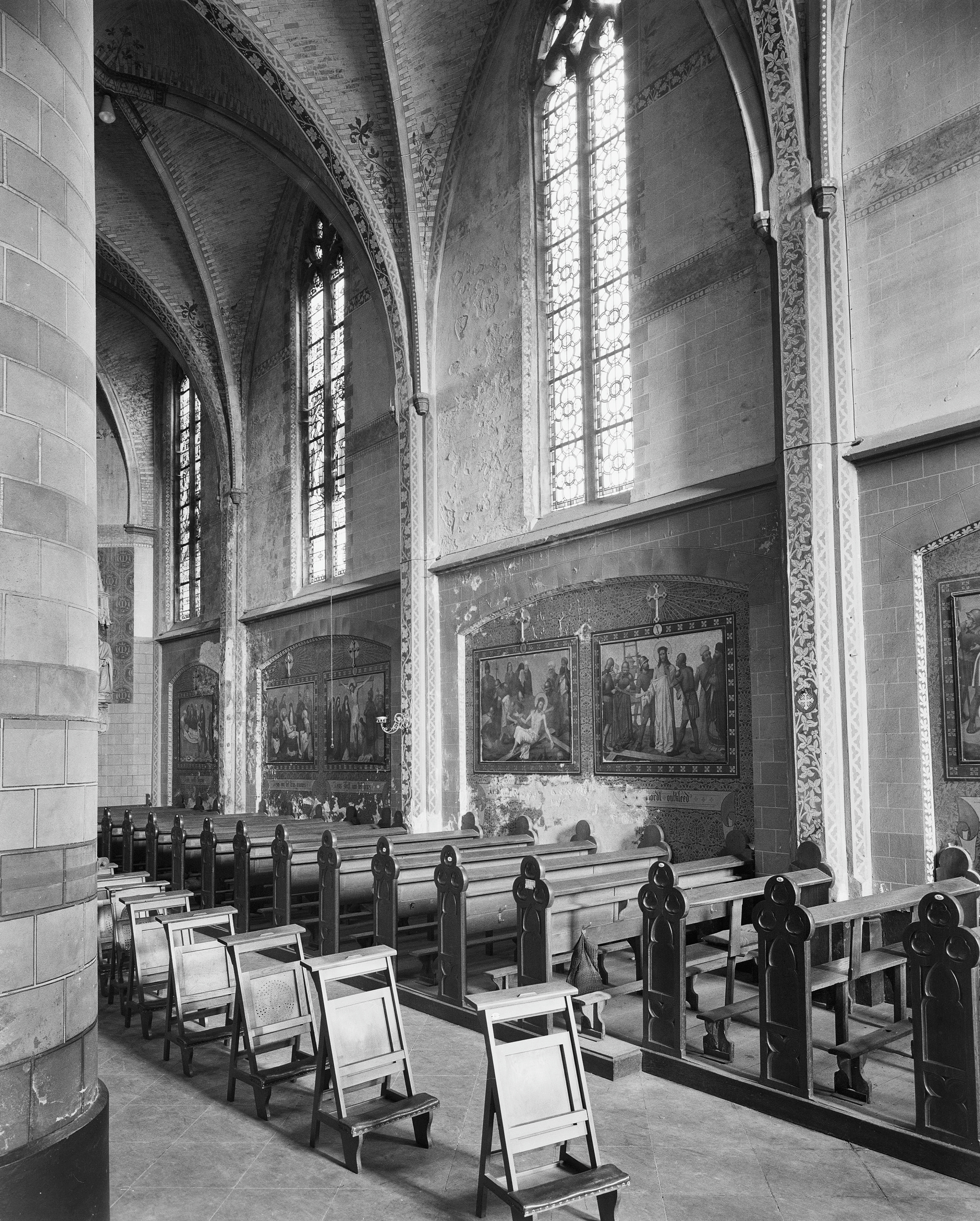 Rooms-Katholieke Kerk: gevel van de zuid zijbeuk